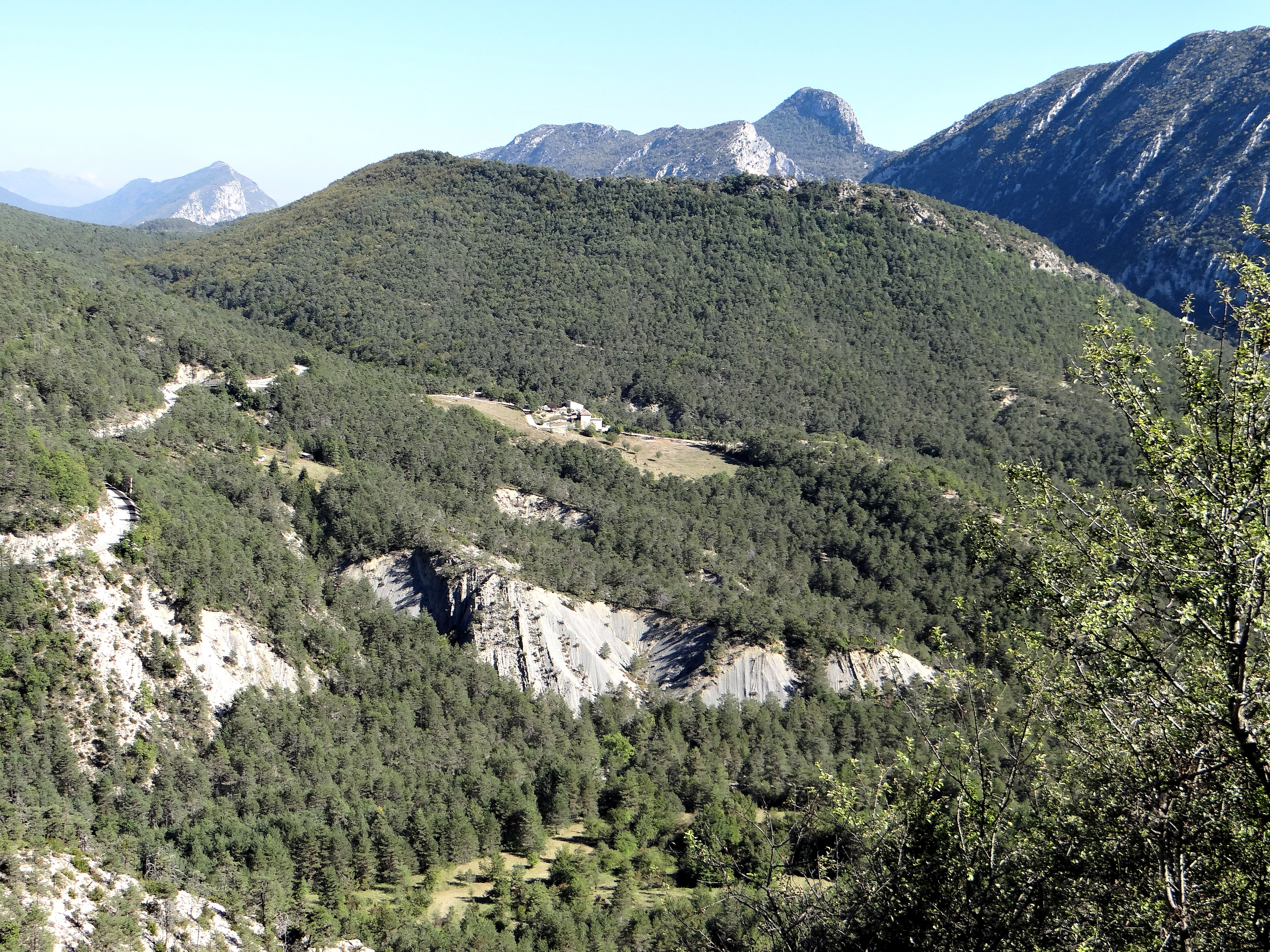 Les Mujouls - Panoramo vers le sud-est du village